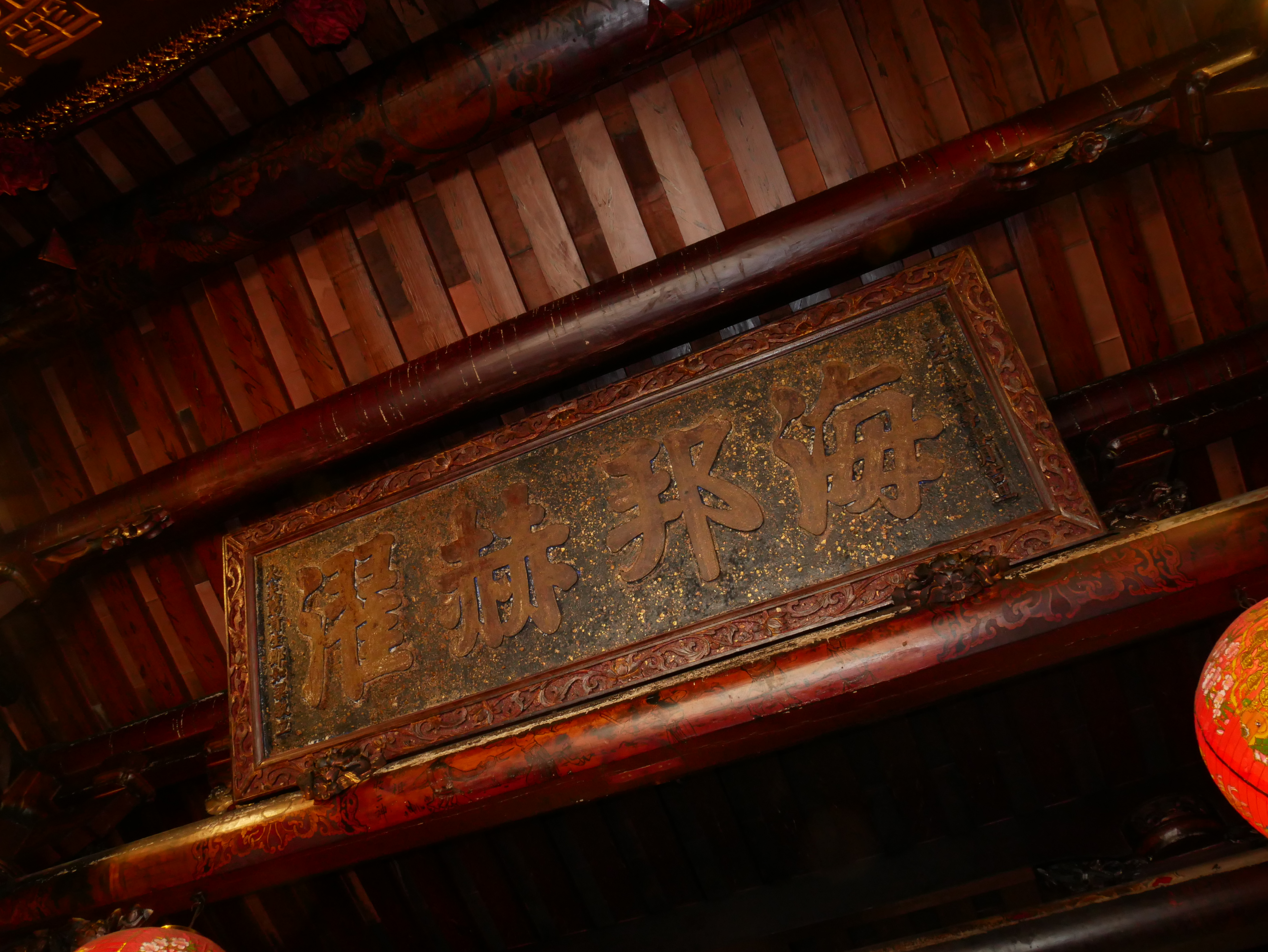 中文（台灣）: 新竹長和宮「海邦赫濯」匾，新竹市北區北門聯里長和里